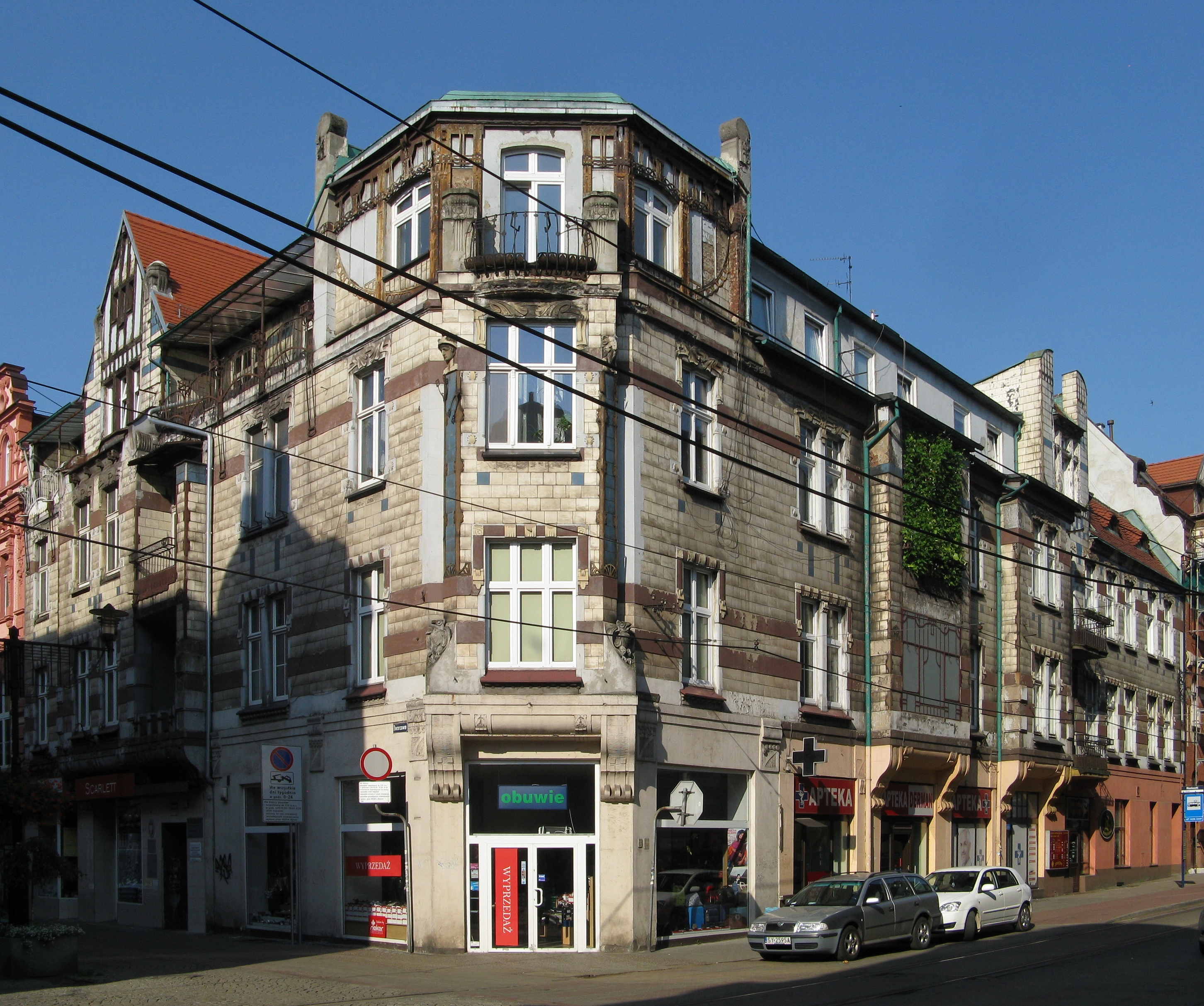 Zabytkowa secesyjna kamienica z 1905 roku przy ulicy Dworcowej 22 w Bytomiu, projekt: Wilhelm Heller.